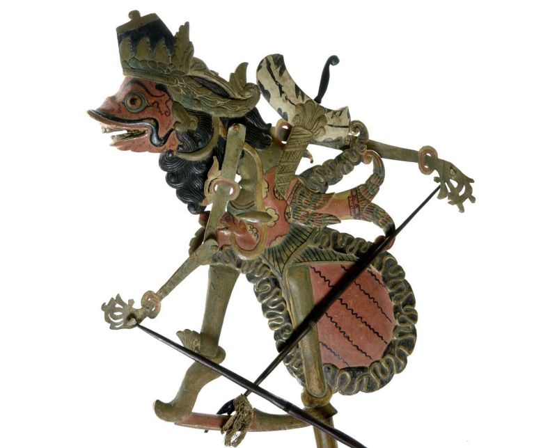 Wajangpop. Wayang Kelitik pop, Menak Jingga voorstellende Unknown language: Wajang kerucil